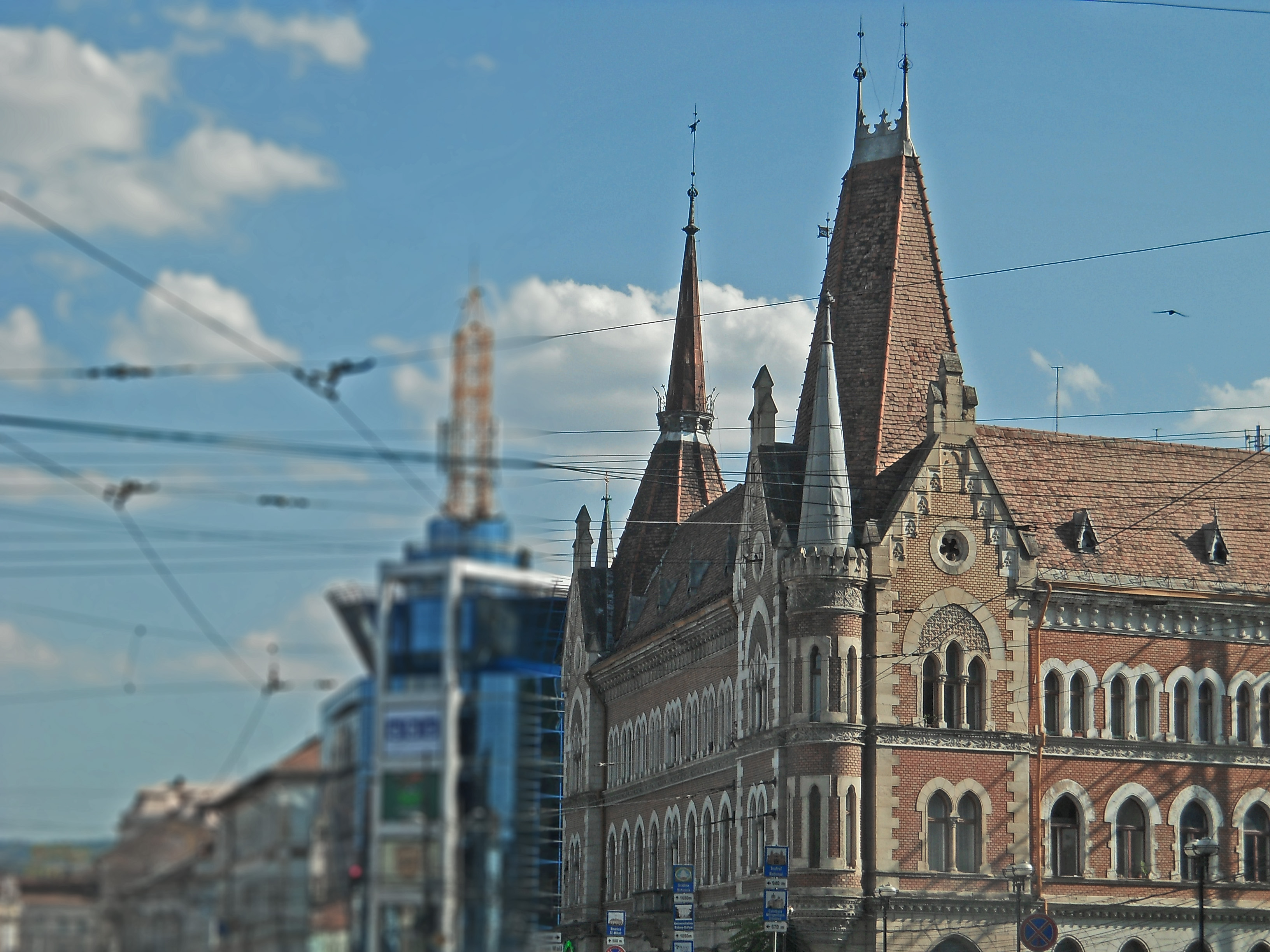 Palatul Szeki